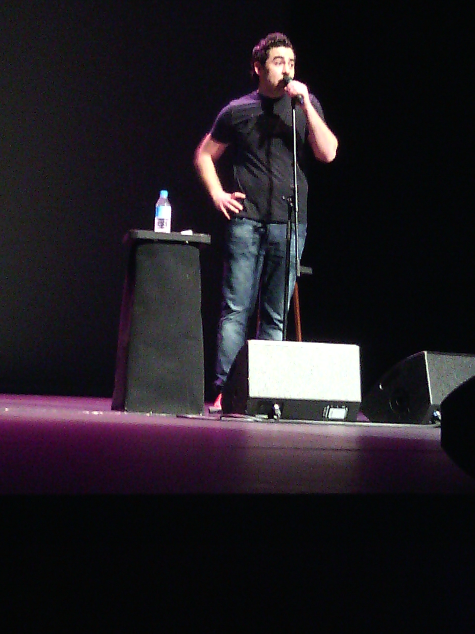 Pablo Chiapella actuando en el Teatro Circo de Murcia en febrero de 2014.